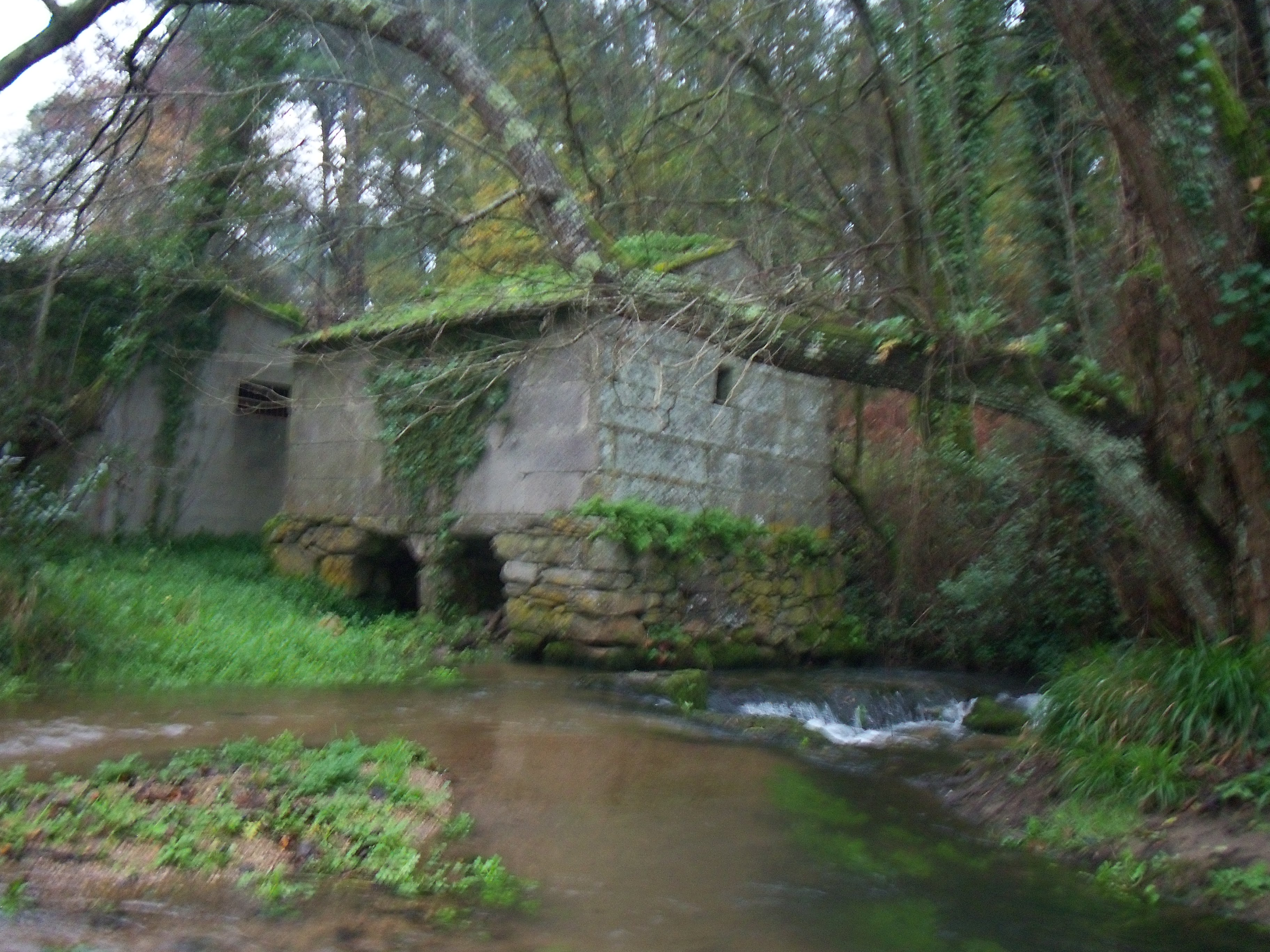 Fotografía de un molino.